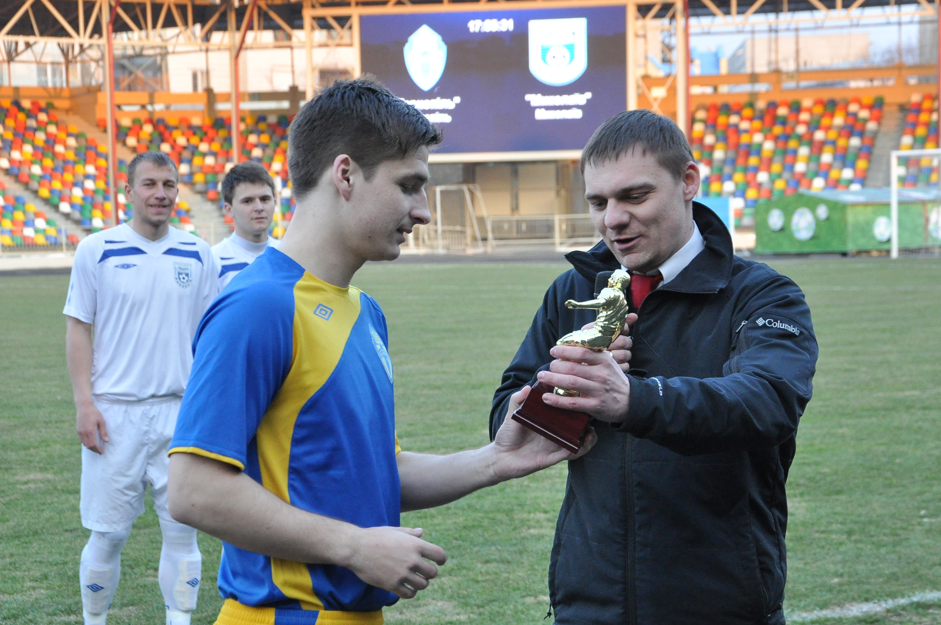 Півзахисник ФК «Тернопіль» Віталій Геннадійович Богданов отримує відзнаку з рук начальника відділу організації та проведення змагань ПФЛ України Євгена Мороза як автор найкращого голу літньо-осінньої частини сезону-2014/15 у першій футбольній лізі України.